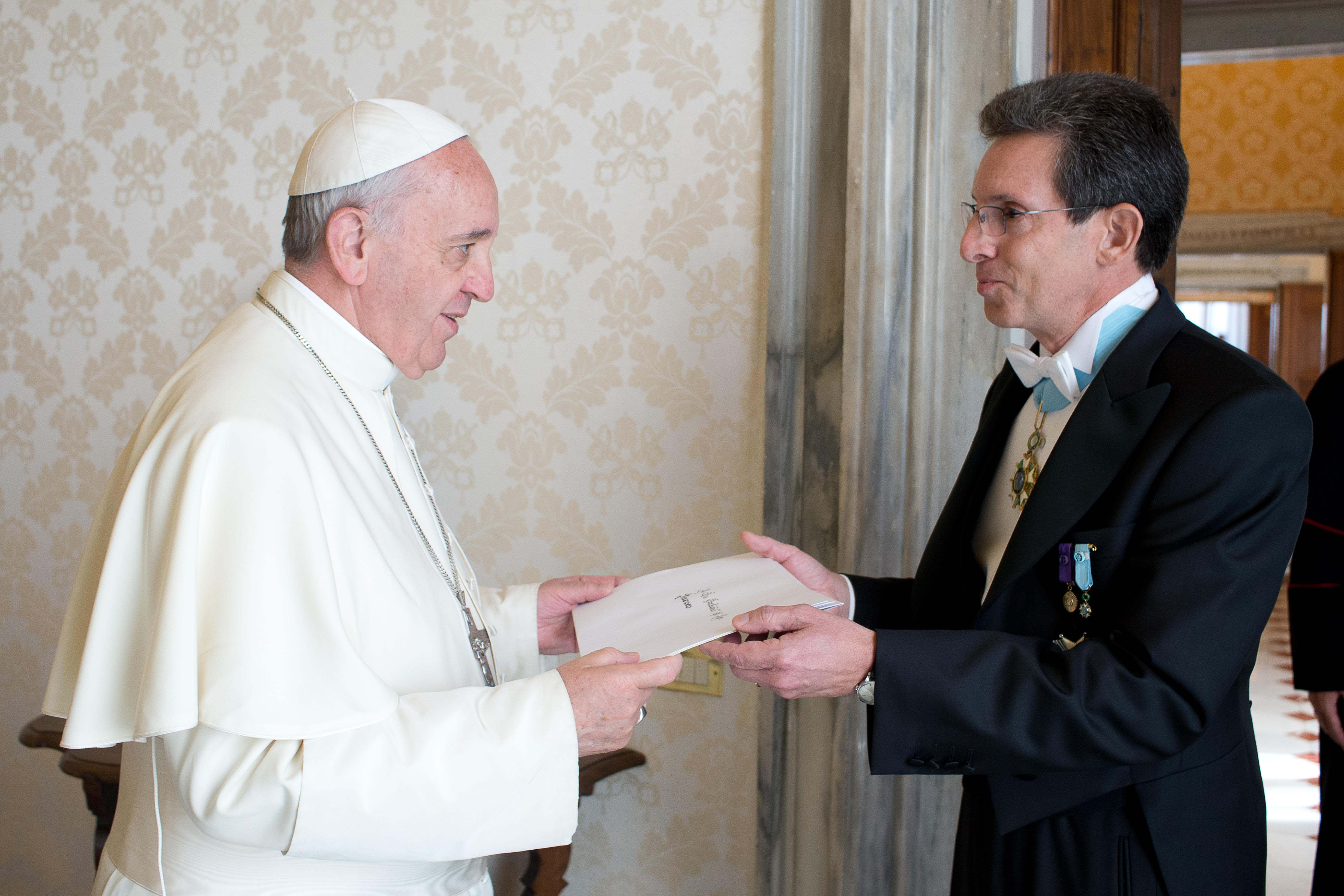 El Embajador Juan Carlos Gamarra Skeels presentó a su Santidad el Papa Francisco las Cartas Credenciales que lo acreditan como Embajador Extraordinario y Plenipotenciario del Perú ante la Santa Sede. Luego de la ceremonia de estilo, desarrollada en el Palacio Pontificio de Ciudad Vaticano, el Embajador Gamarra fue recibido en Audiencia Privada por el Cardenal Tarcisio Bertone, Secretario de Estado de la Santa Sede.